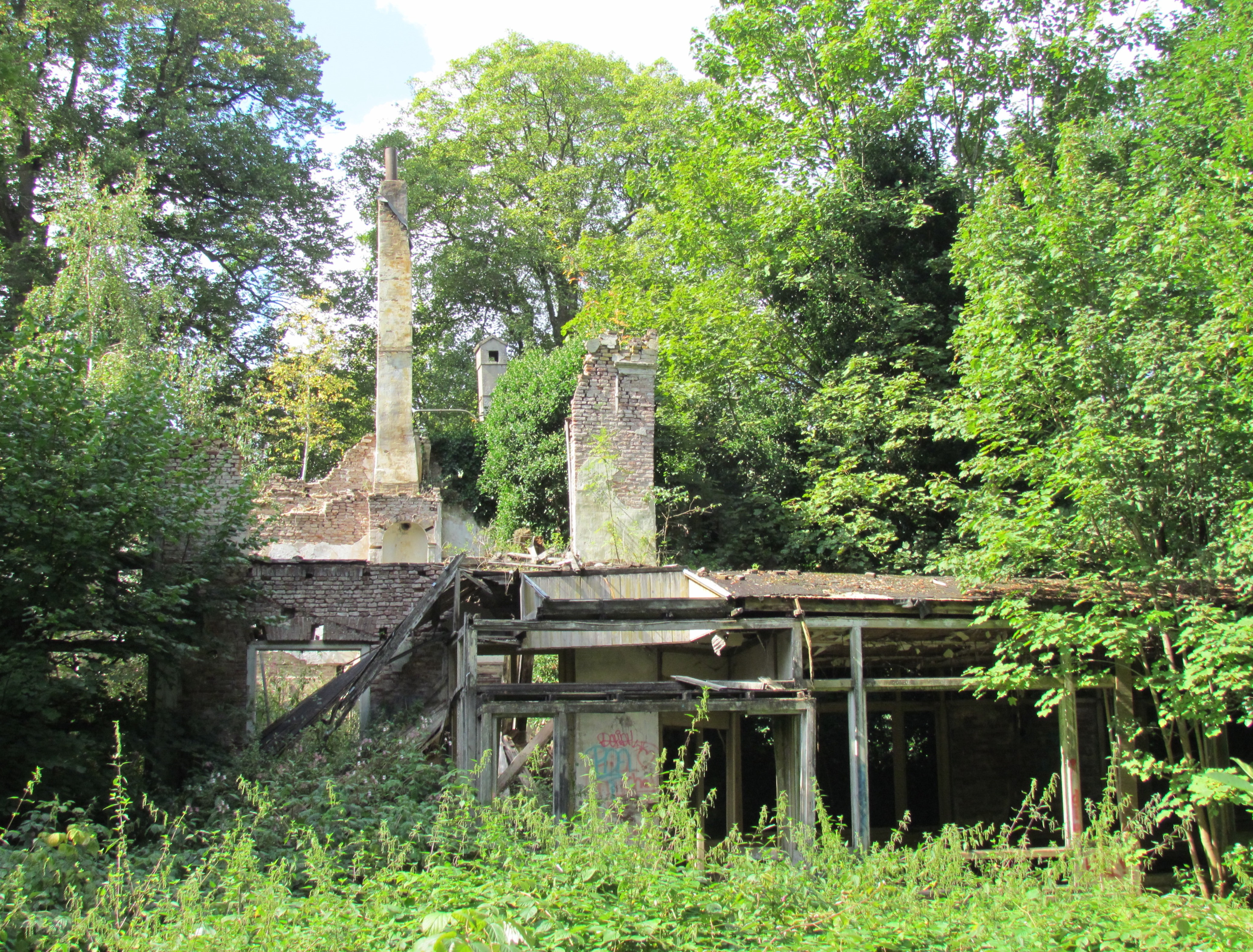 De ruïne van het voormalige hotel Dullemond in Laag-Soeren